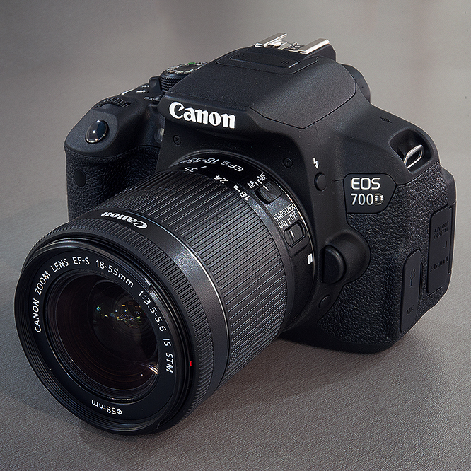 Фотоаппарат Canon EOS 700D с объективом Canon EF 18-55 mm f/3.5-5.6 IS STM